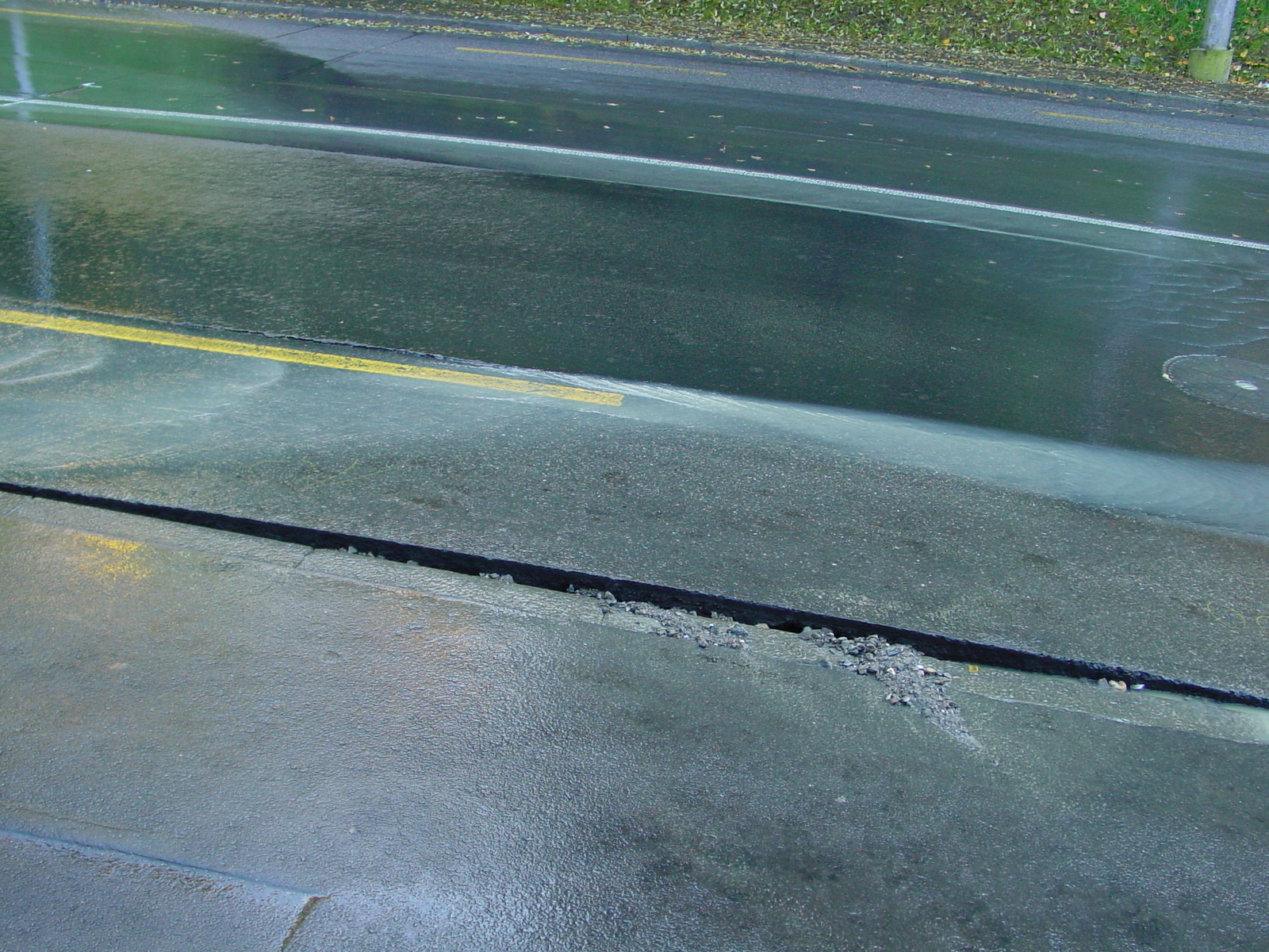 Wasserrohrbruch noch unter dem Asphalt verdeckt